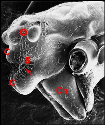 Prosoma d' Argyrodes de type "lippu" au microscope à balayage.